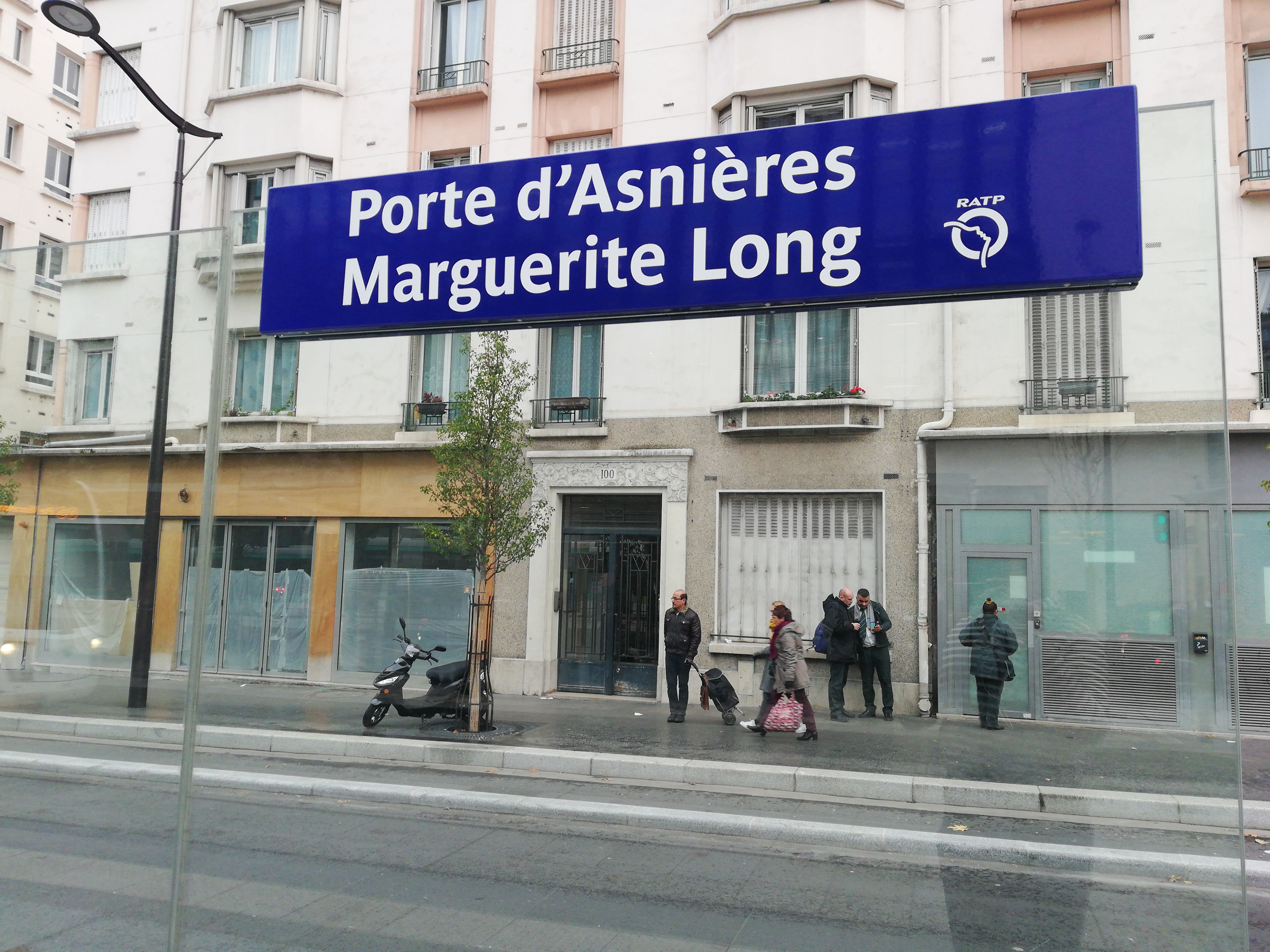 Plaque signalétique de la station Porte d'Asnières - Marguerite Long de la ligne 3b du tramway d'Île-de-France, le jour de l'ouverture du prolongement de la ligne de Porte de la Chapelle à Porte d'Asnières, en 2018.